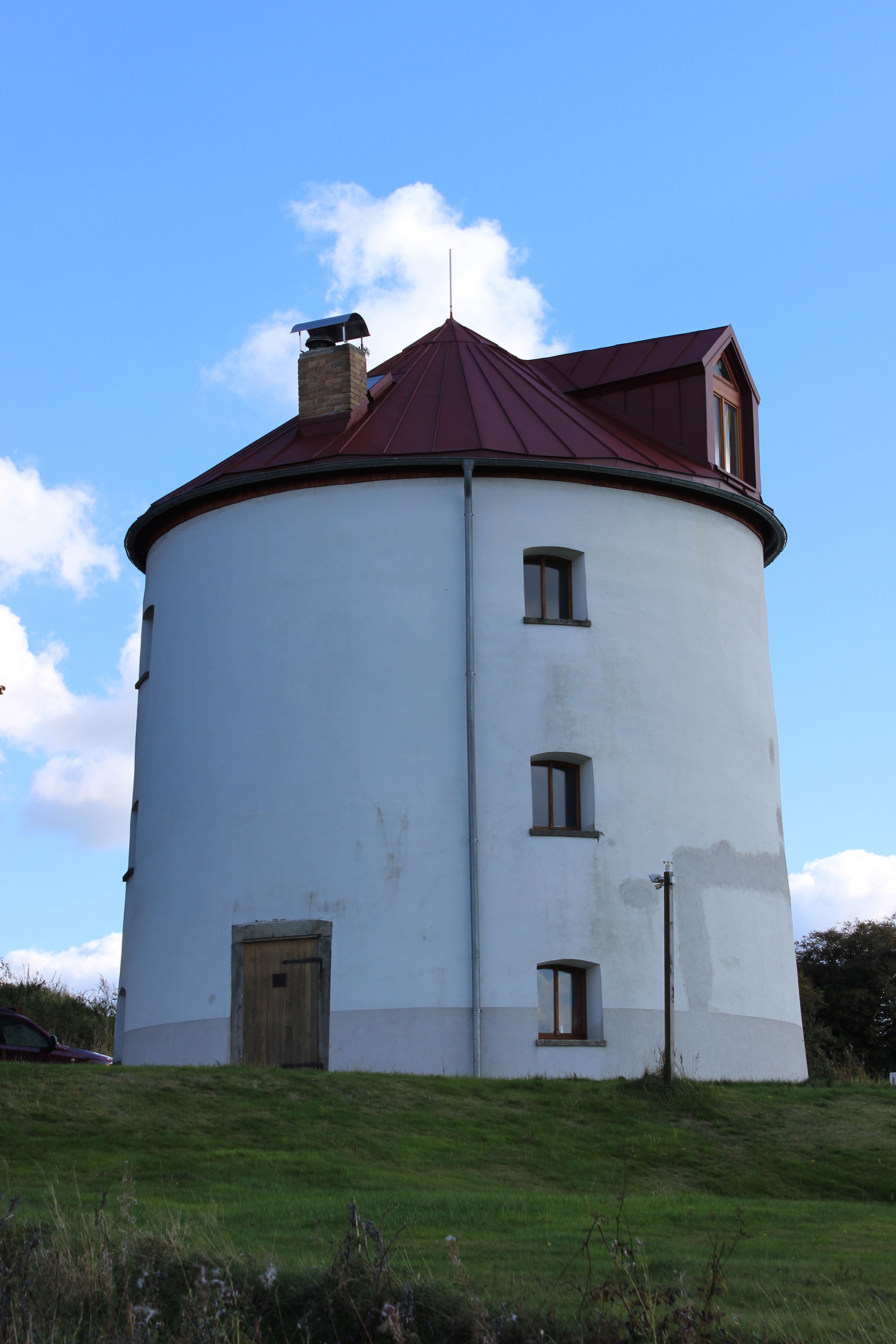 Bývalý větrný mlýn (dům číslo popisné 7) na Františkově Vrchu.